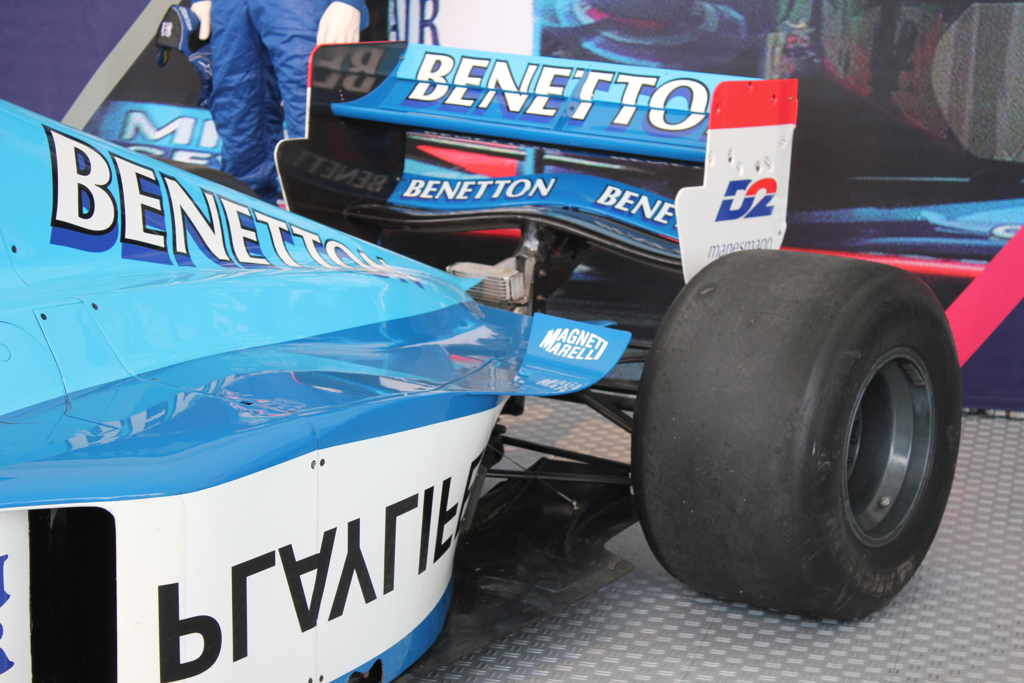 Der Heckflügel eines Benetton B198